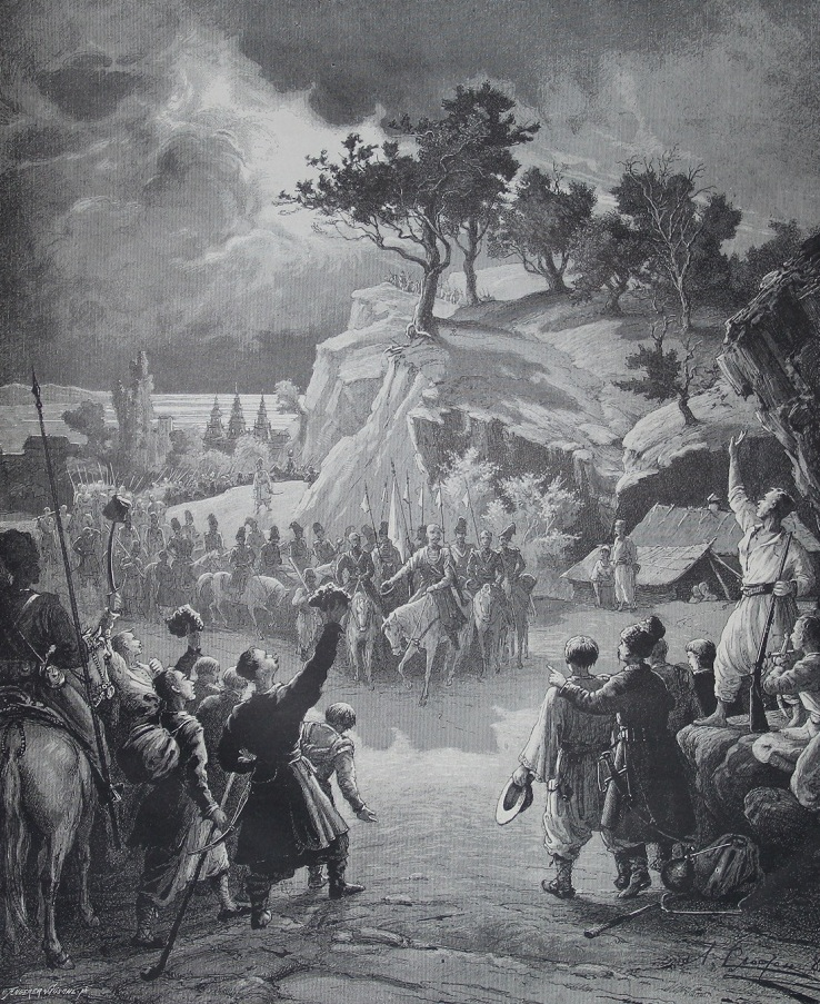 Artwork by Ukrainian artist Opanas Slastion. Ілюстрації до поеми Тараса Шевченка "Гайдамаки" Publishing Aleksey Suvorin 1886.